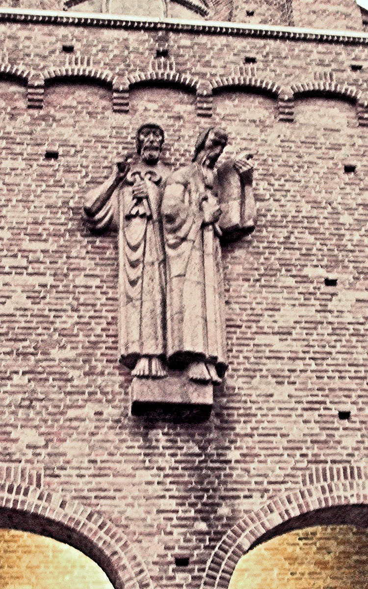 rk. Petrus-und-Pauluskirche in Middelburg, eingeweiht 1951, Architekt C.M. van Moorsel, der eine romanische Basilika im Stil der „Bossche School“ (s'Hertogenbosch) entwarf.